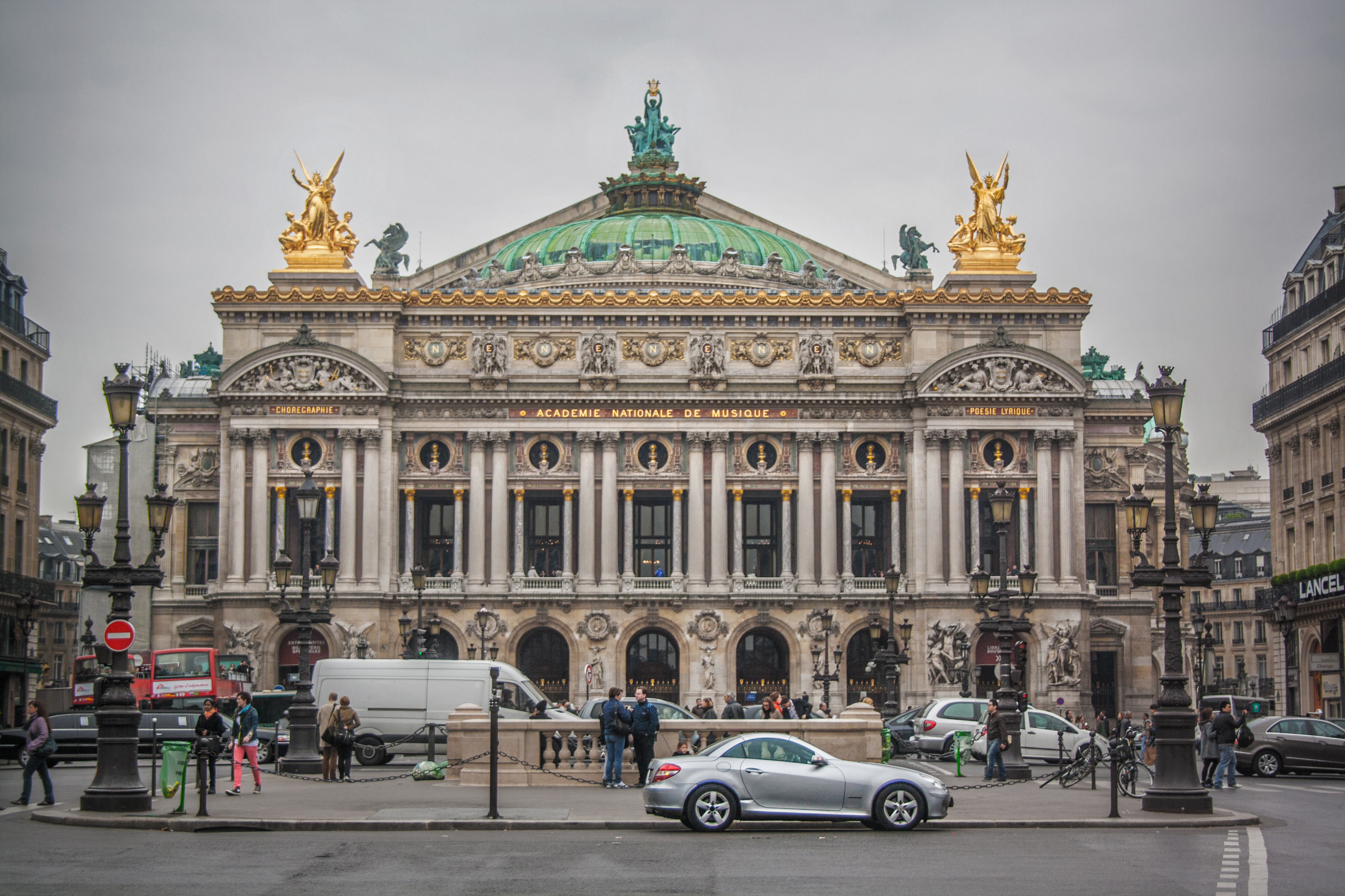 París, Francia